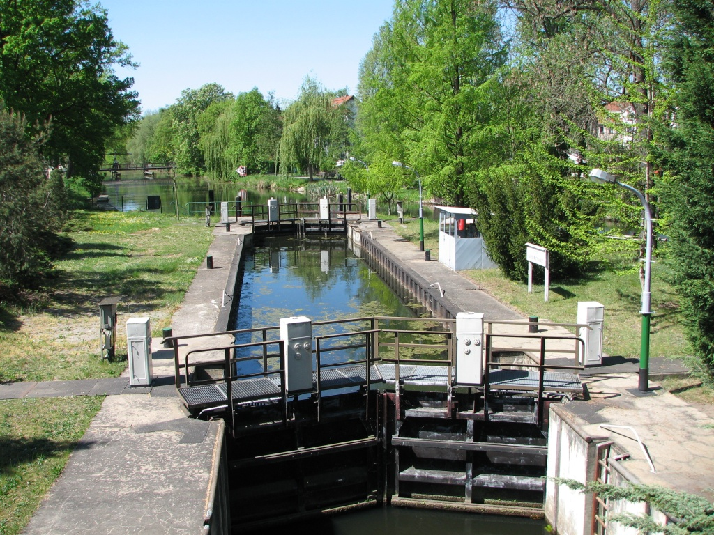 Schleuse bei Königs Wusterhausen